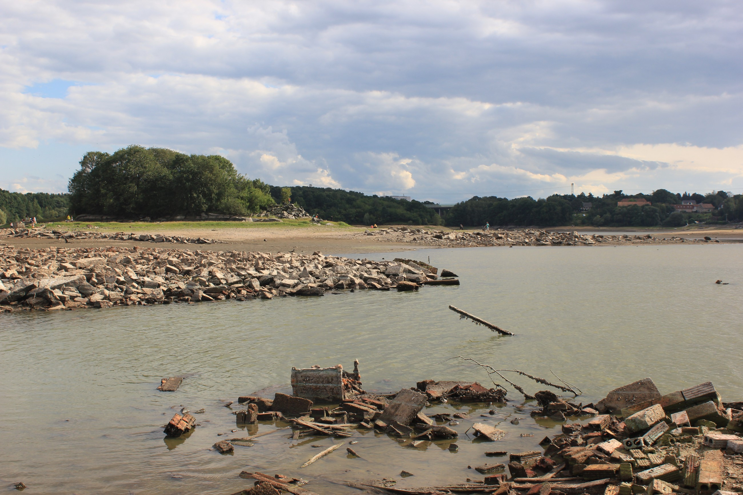 Hornjoserbsce: Powostanki něhdyšeje wsy Małsec w Budyskim spjatym jězorje.